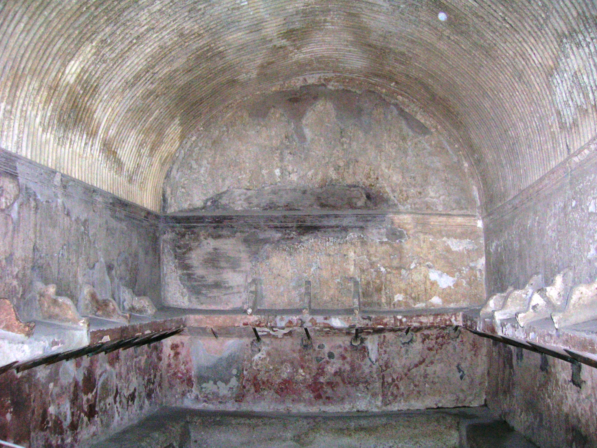 Terme del Foro